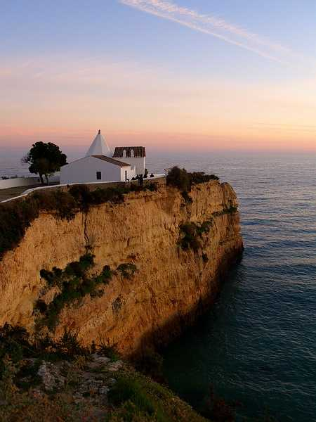 à Porches (Portugal)